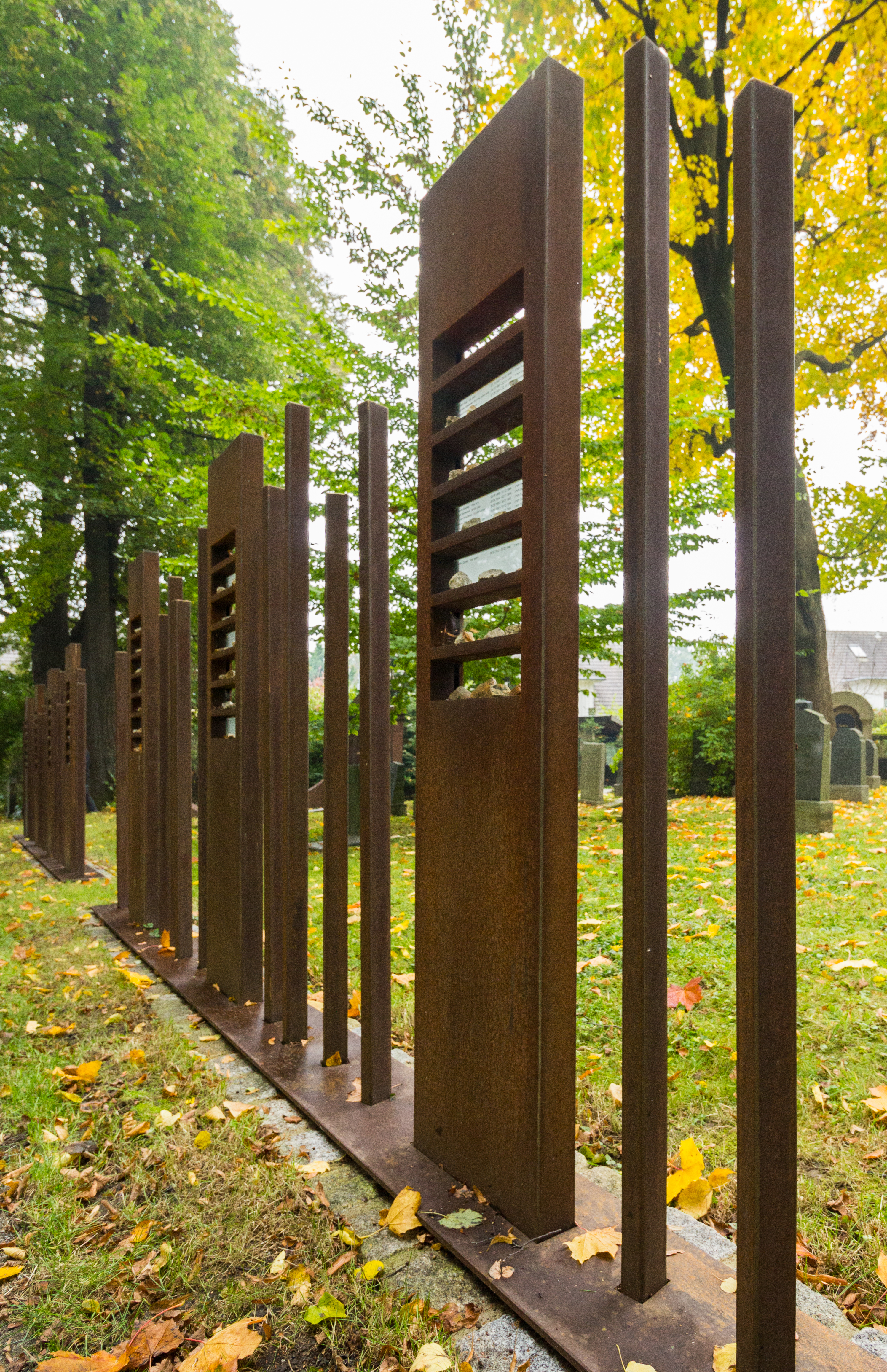 Sieben eiserne Stehlen, Jüdischer Friedhof Görlitz